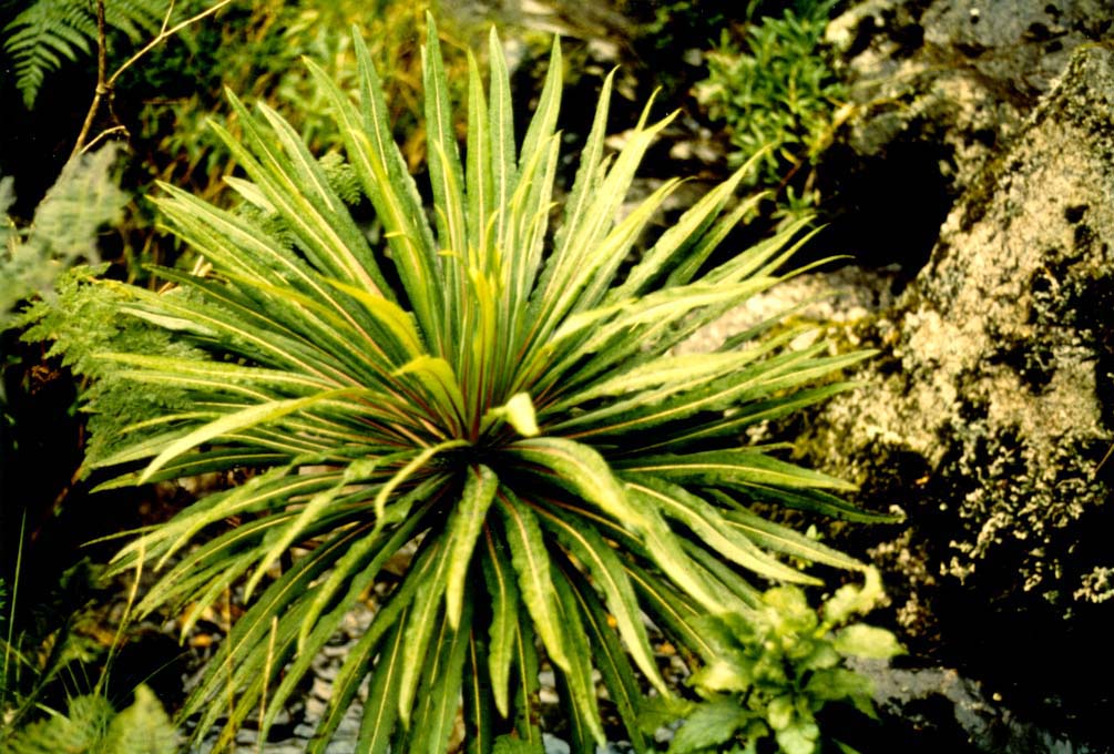 Eine Lobelien-Art des Berg-Regenwaldes mit Blättern, die in perfekter kugelförmiger Symmetrie angeordnet sind. Ruwenzori-Gebirge, Uganda, Standort orografisch links des Bujuku-Flusses.